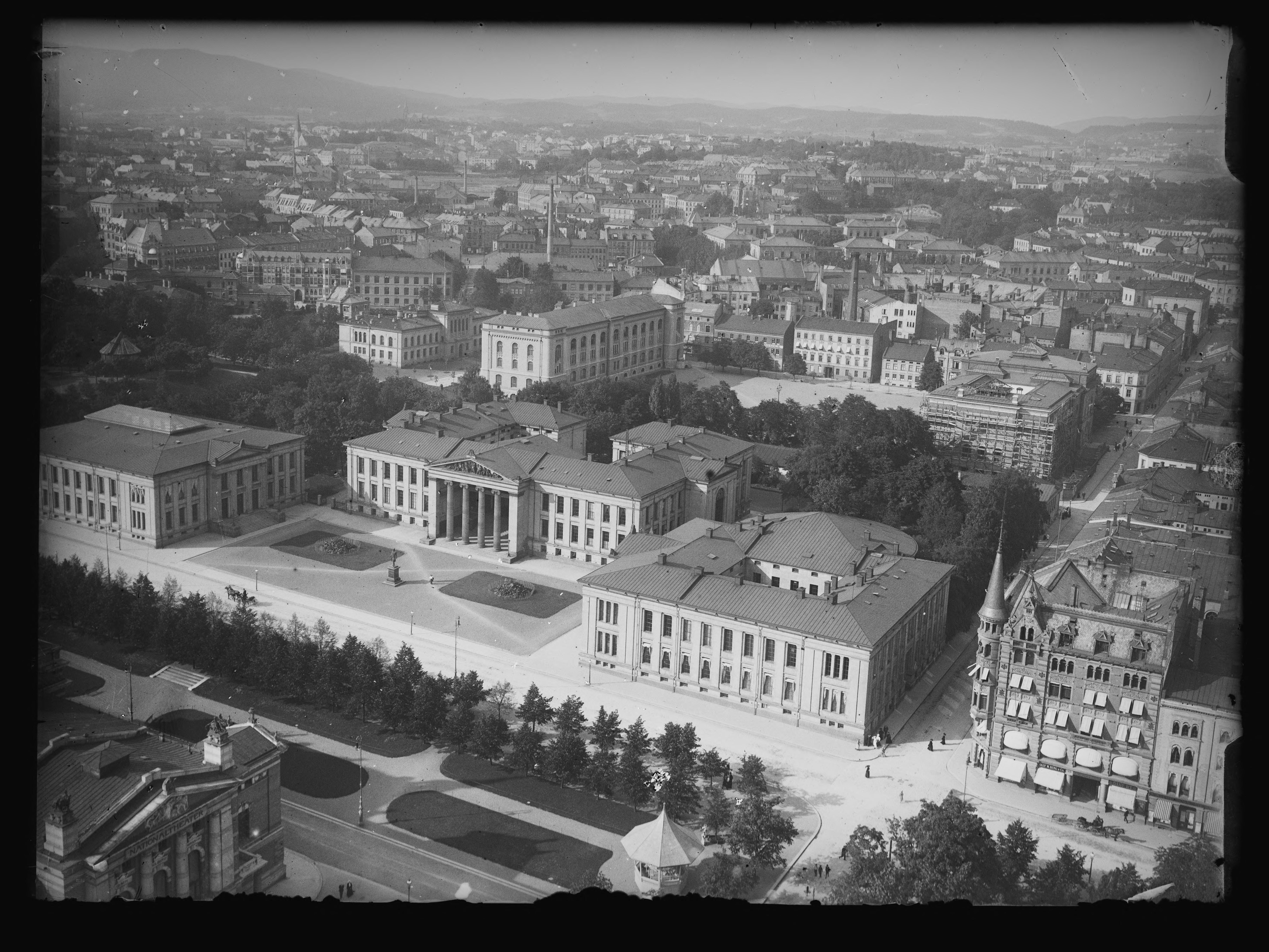 Bildet er hentet fra Nasjonalbibliotekets bildesamling. Anmerkninger til bildet var: Påskrift arkivark: Utsigt over Kr.ania set fra Balonen Arkivnummer: 214 Oslo, Oslo, Oslo